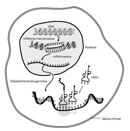 RNA nukleoan transkribatzen da; ondoren, prozesatu, zitoplasmara garraiatu eta erribosomen bidez itzultzen da daraman informazio genetikoa. Azkenik, mRNAren degradazioa gertatzen da.